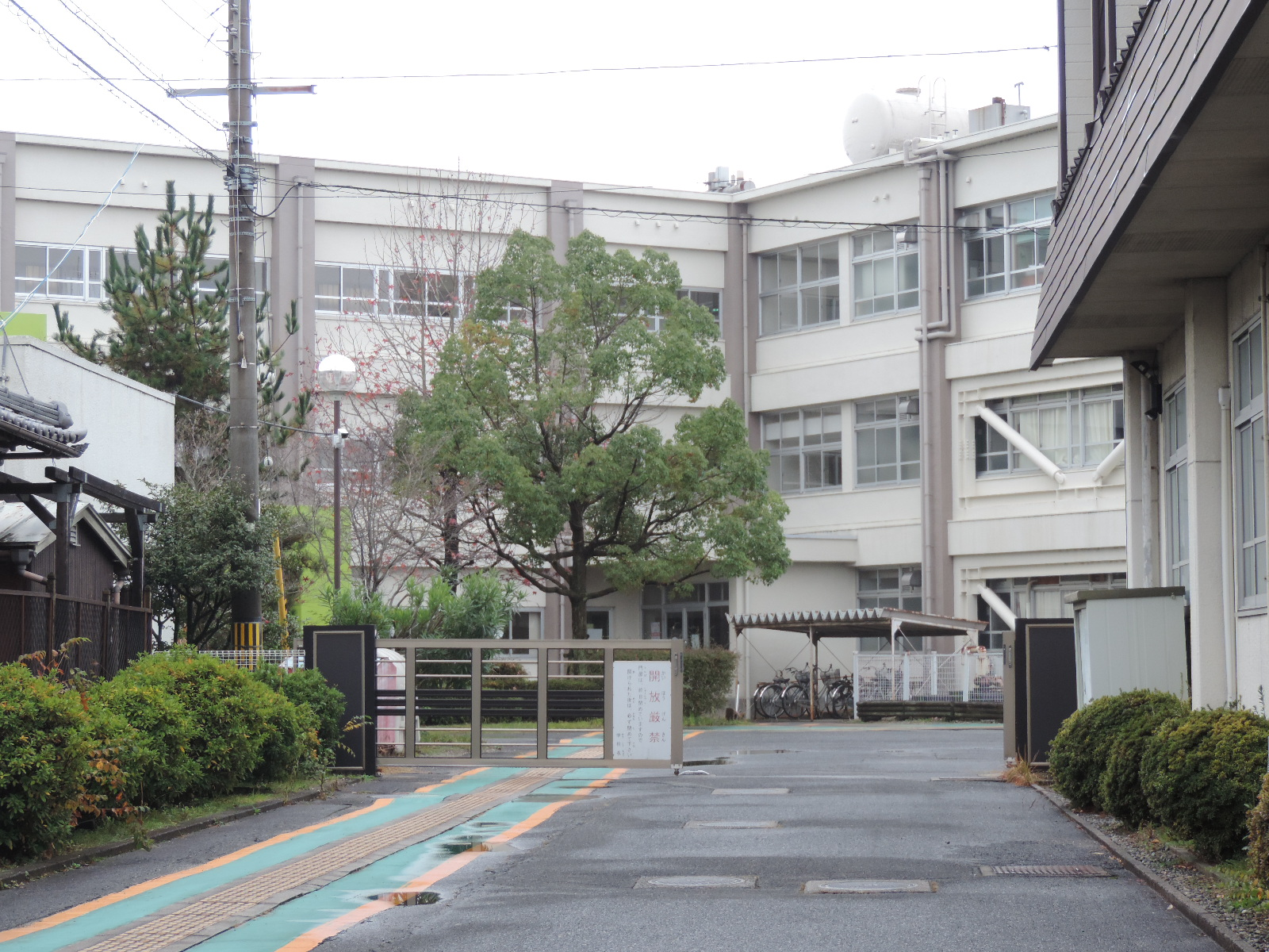 滋賀県立聾話学校。2017年撮影。